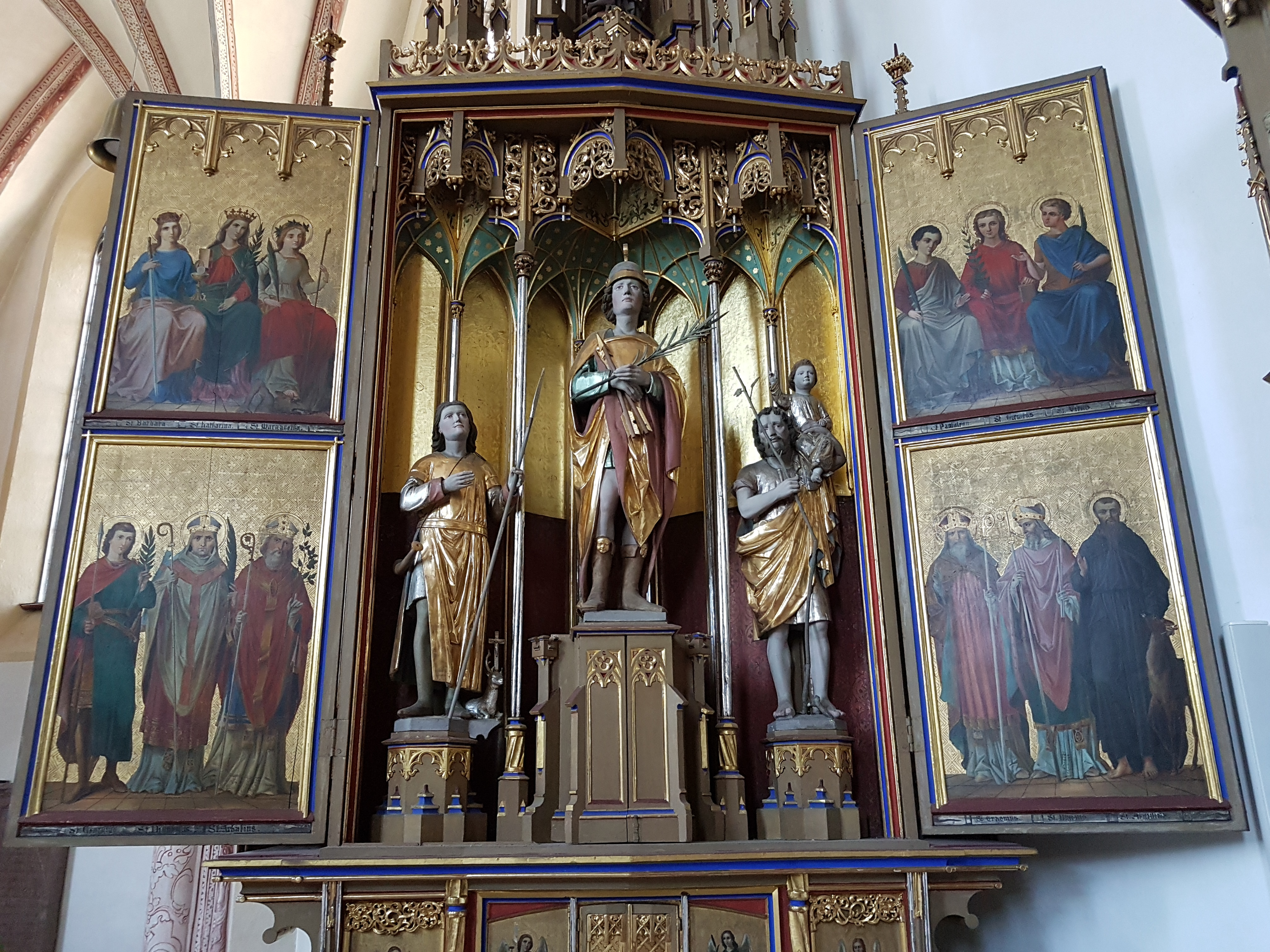 St. Johann der Täufer (Petting)